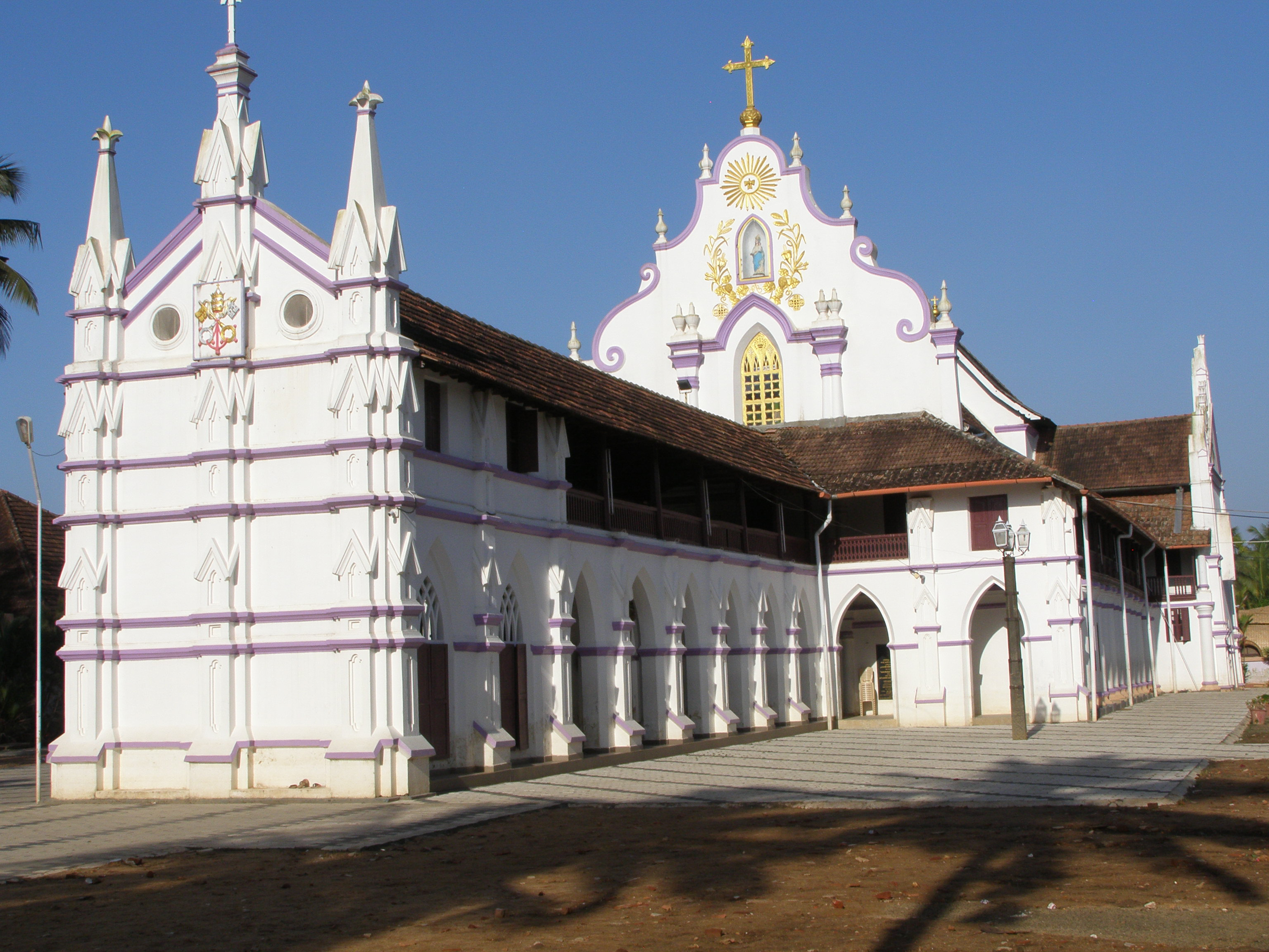 Eglise St. Marie de Chamakulam - Kerala - Inde